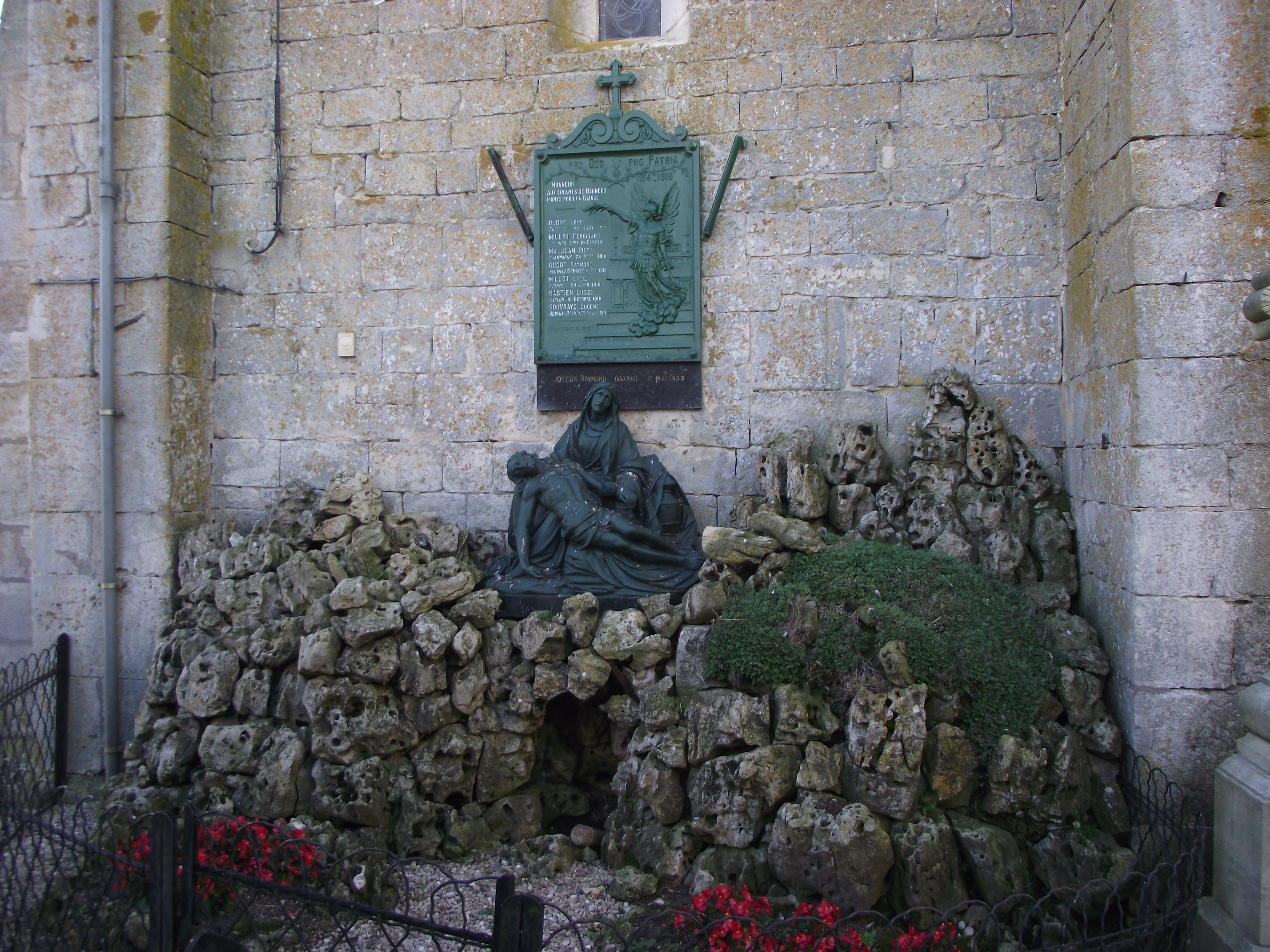 Le monuments aux Morts est situé sur le coté droit de l'église du village. Sur le monument on peut lire : HONNEUR AUX ENFANTS DE BAGNEUX MORTS POUR LA FRANCE